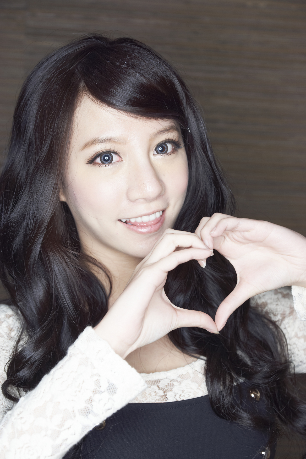 台灣藝人林采緹